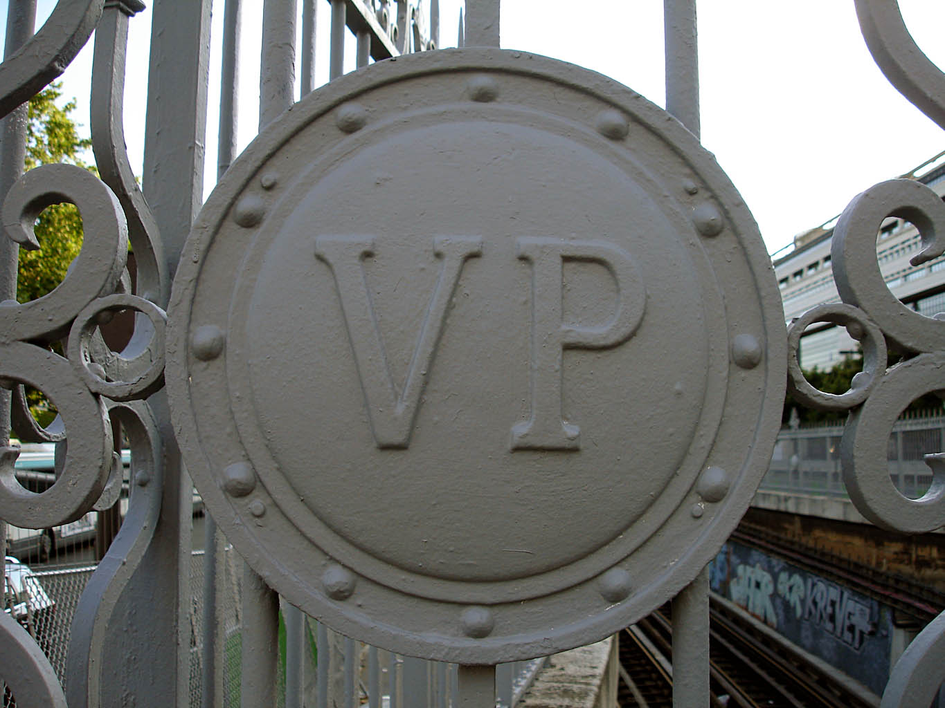 Détail de ferronnerie de la ligne 6, à proximité de la station Bercy du métro de Paris, France.